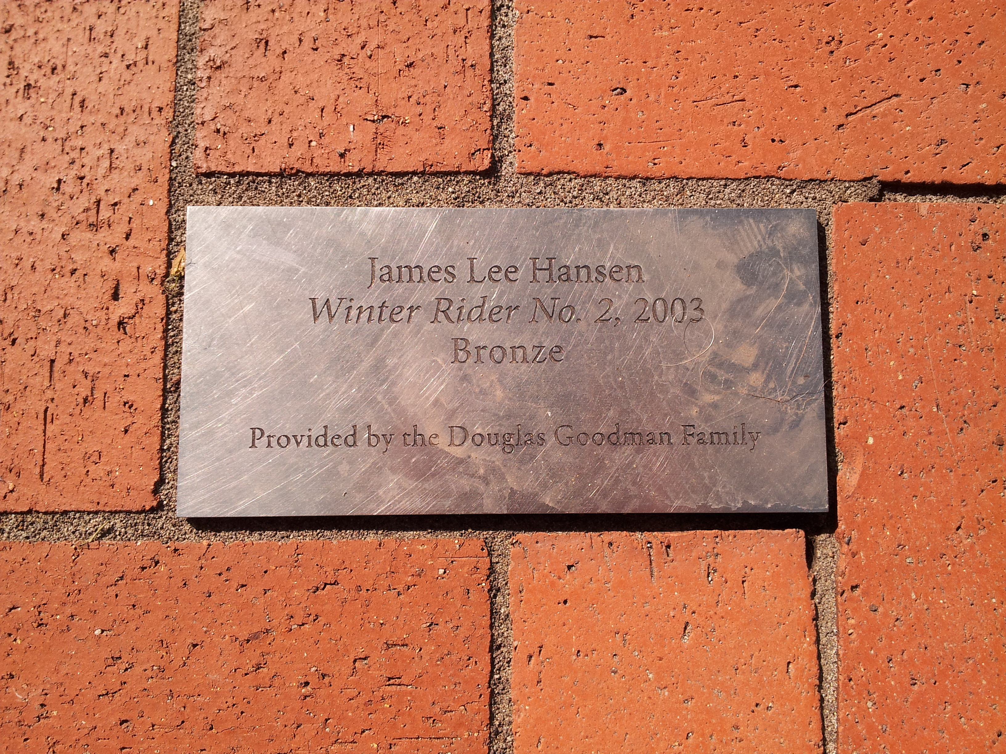 Winter Rider No. 2, Portland